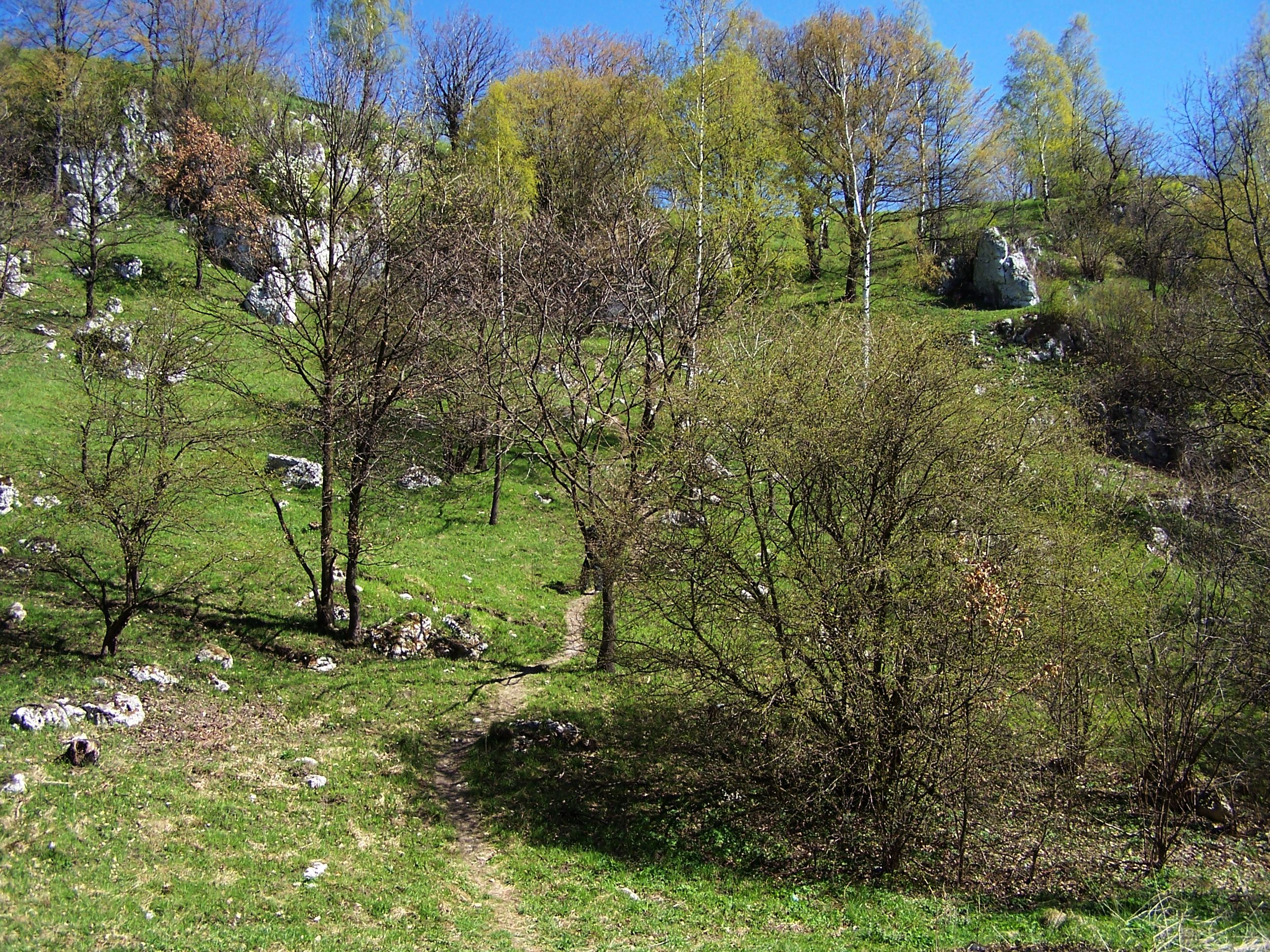 Dolina Kluczwody